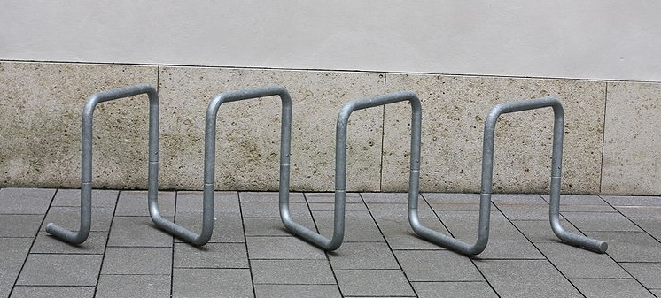 Bicycle rack, Fahrradständer in Wien, Vienna